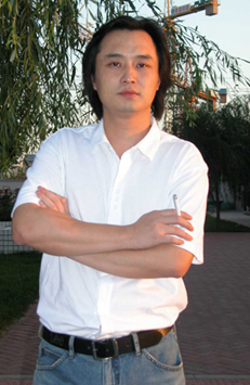 中國大陸詩人葉匡政。